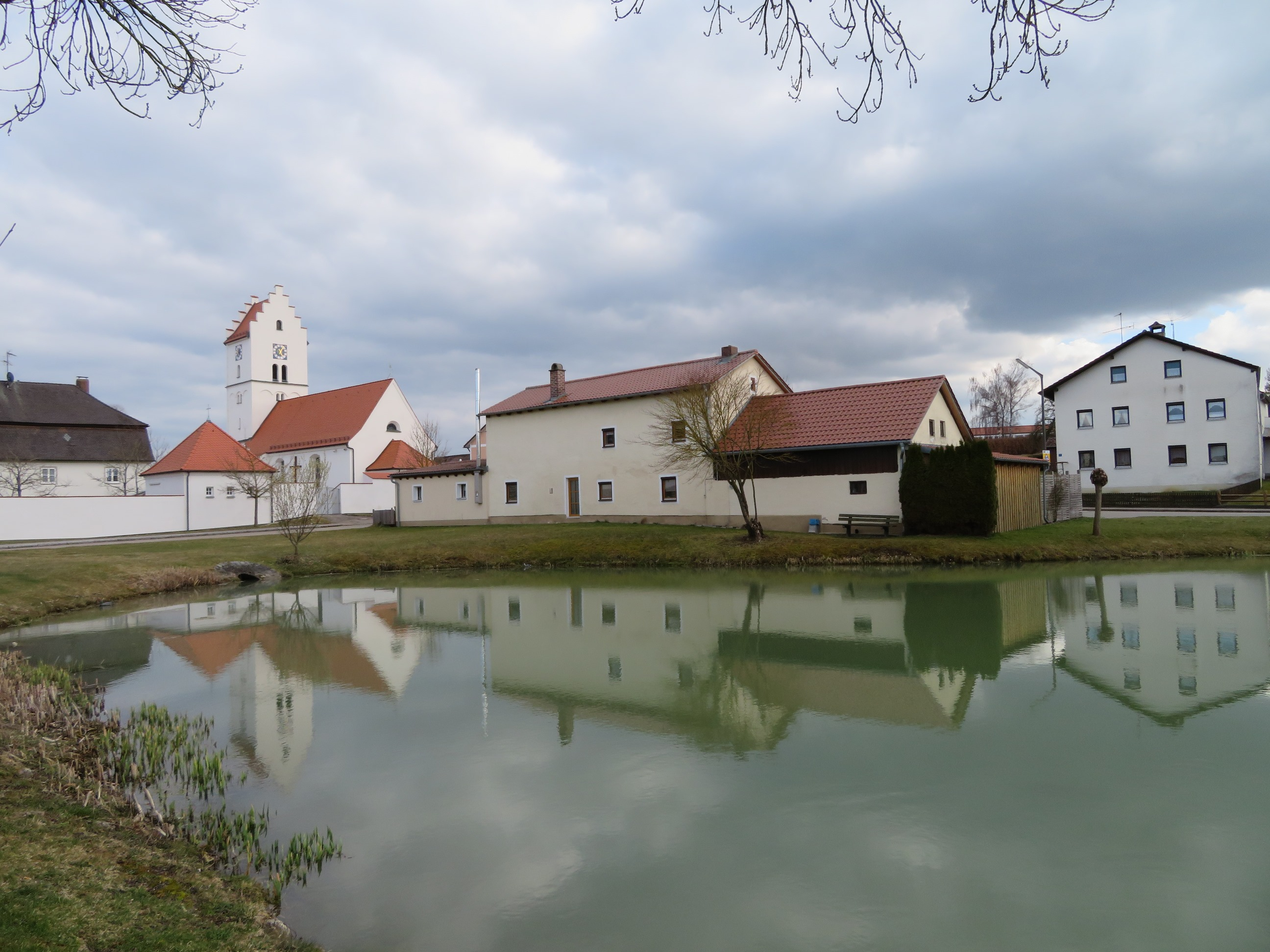 St. Nikolaus in Ochsenfeld